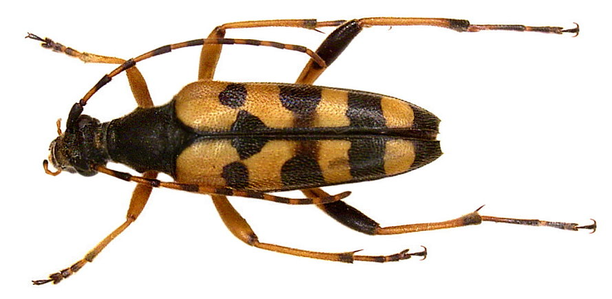 Familie: Cerambycidae Grösse: 14-20 mm Verbreitung: Europa Ökologie: Entwicklung in Laubhölzern Fundort: Germania, Bayern, Oberfranken, Kulmbach leg.det. U.Schmidt, 1972 Foto: U.Schmidt, 2006